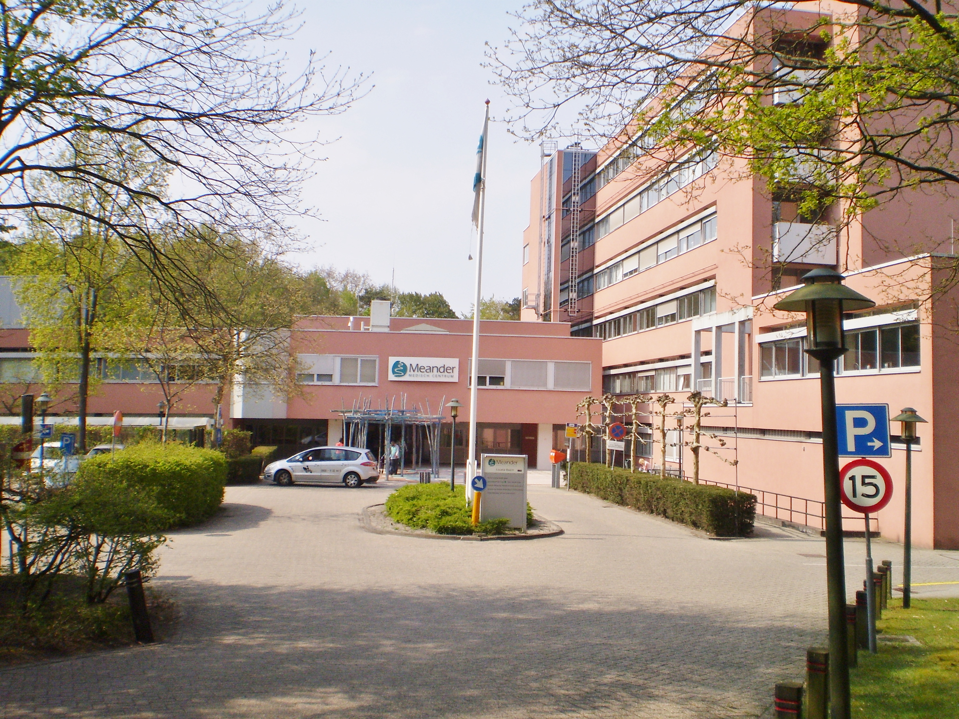 Hoofdingang